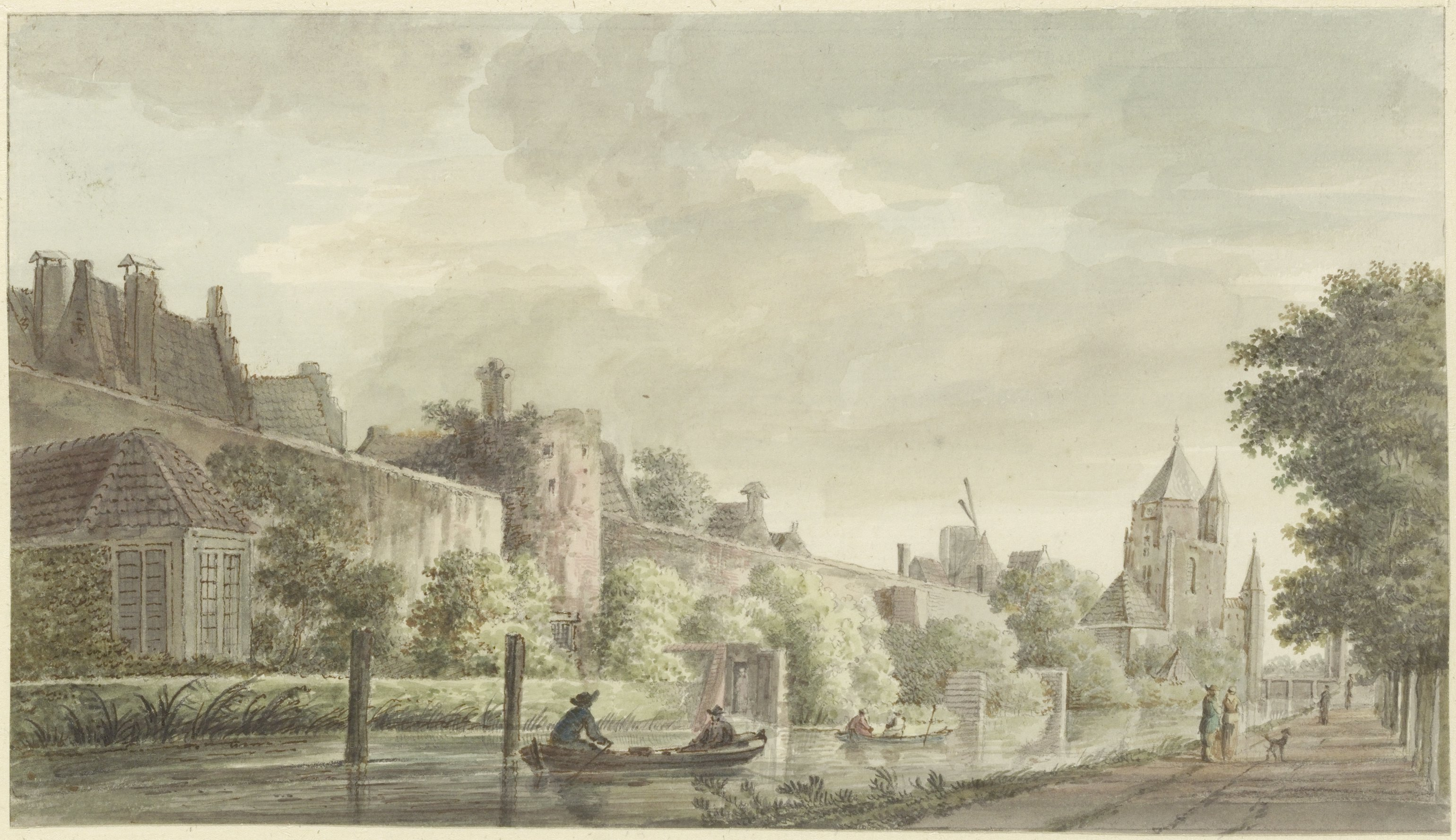 [Stadswal tussen de Amsterdamse Poort en de Schalkwijkerpoort, ziende naar het noorden, ca.1780. h.14½, br.26 cm. Negatiefnummer Index Bouwkunst Zeist (KHIU): 8014 Dia KB aanwezig], door: [H. Tavenier], Noord-Hollands Archief / [Kennermerland], [NL-HlmNHA_53000541_K]